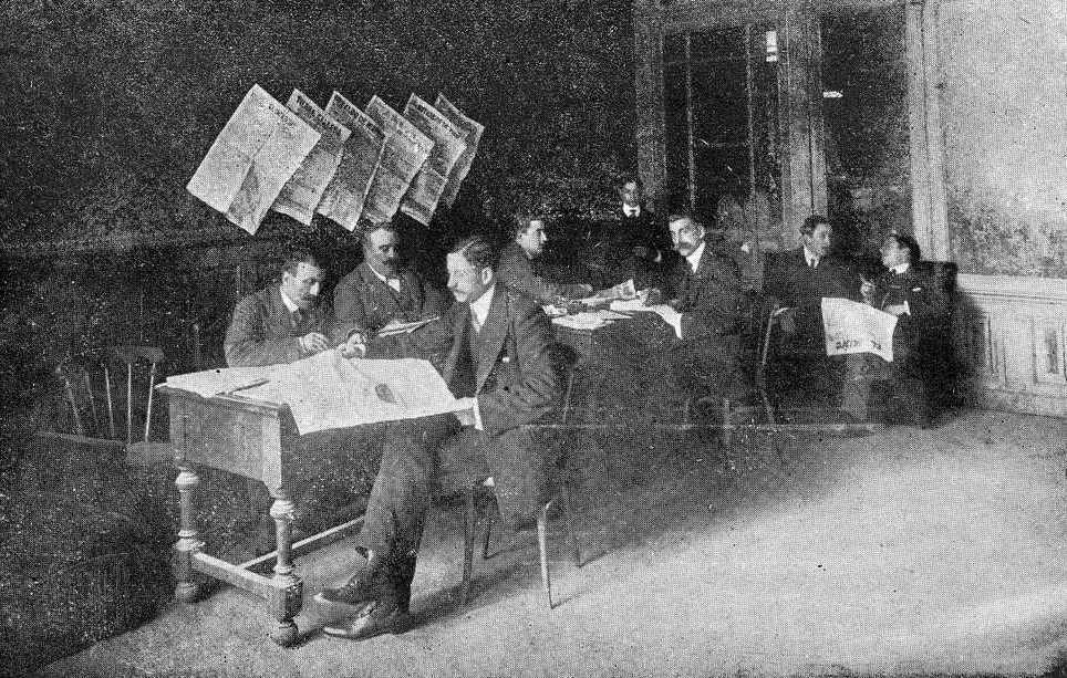 Redacción de El Miño (Ourense) en 1909. Fotografía en Vida Gallega.De esquerda a dereita:Vicente Romero (redactor), Luis Pérez (administrador), Fernando Gobart (redactor), Adriano de la Seca (redactor), mozo de redacción,Vicente Requejo (redactor), Francisco Álvarez de Nóvoa (director) e Eugenio López Aydillo.